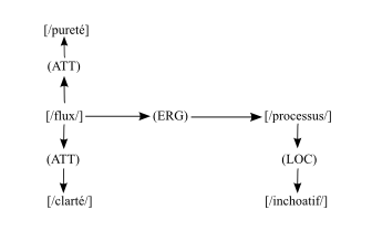 Molécule sémique de la phrase Allume l'aube dans la source d'Eluard, par François Rastier, dérivée du graphe de Sowa. Cette molécule est paru dans "FORMES SÉMANTIQUES ET TEXTUALITÉ", revue Langages, 2006, n°163, p. 99-114. ATT=Attributif ; LOC=Locatif ; ERG=Ergatif.